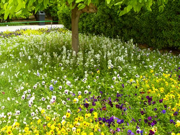 گلها در باغ دلگشا-شیراز